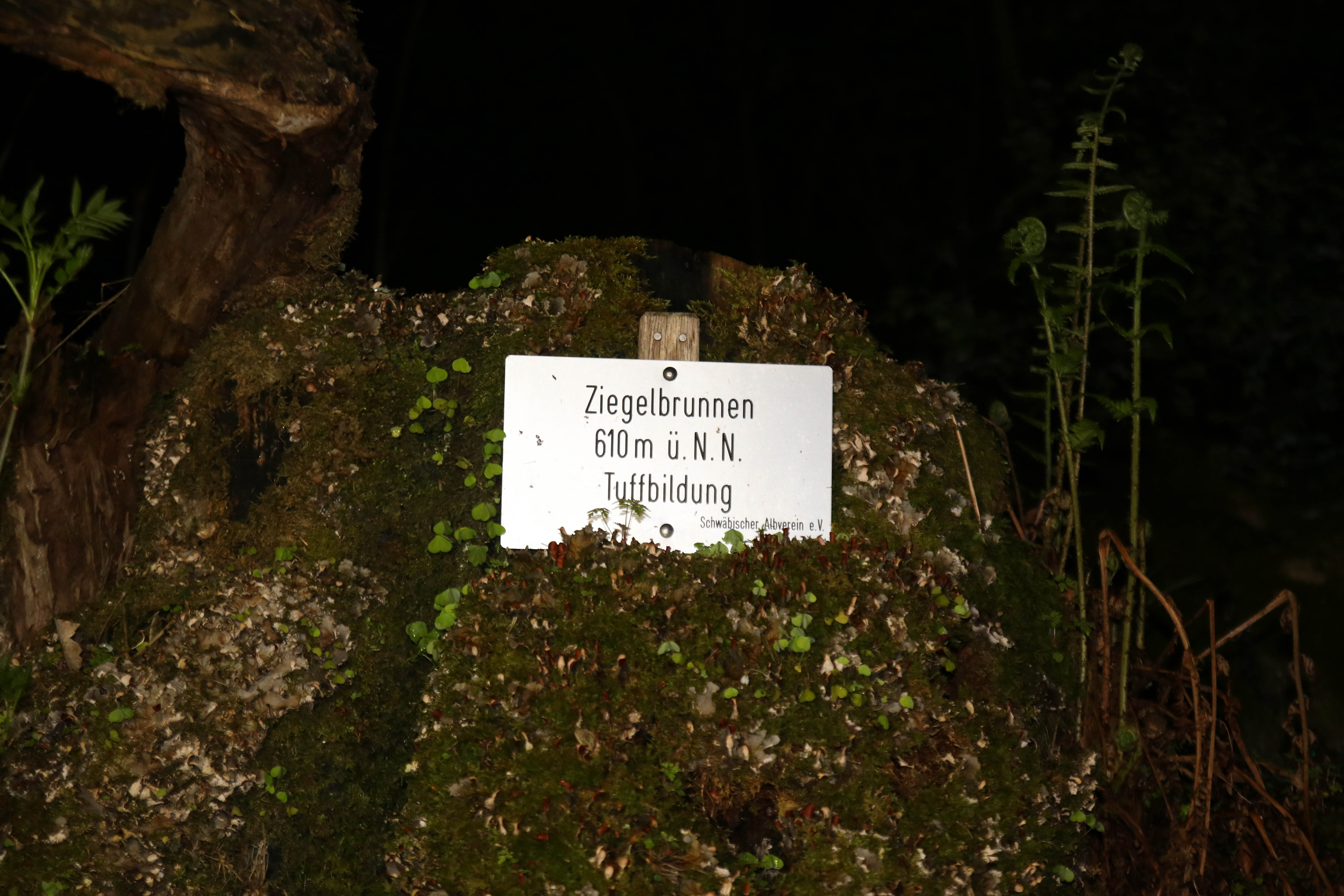 Schild des Schwäbischen Albvereins am Ziegelbrunnen in Lichtenstein-Unterhausen (610m ü.N.N.)